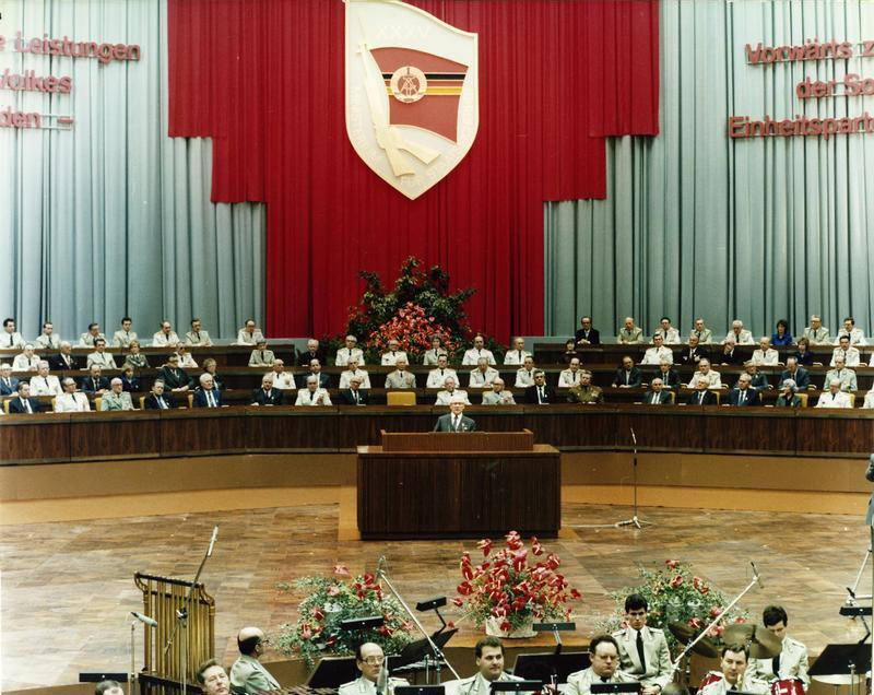 ADN-ZB Franke 6.2.85 Berlin: Kampfmeeting Auf einem eindrucksvollen Kampfmeeting im Palast der Republik zum 35. Jahrestag der Bildung des Ministeriums für Staatssicherheit sprach der Generalsekretär des ZK der SED und Vorsitzende des Staatsrates der DDR, Erich Honecker.